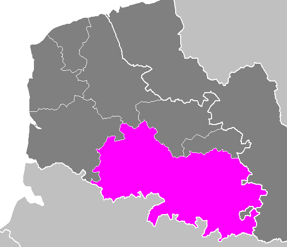 Arrondissement_d'Arras